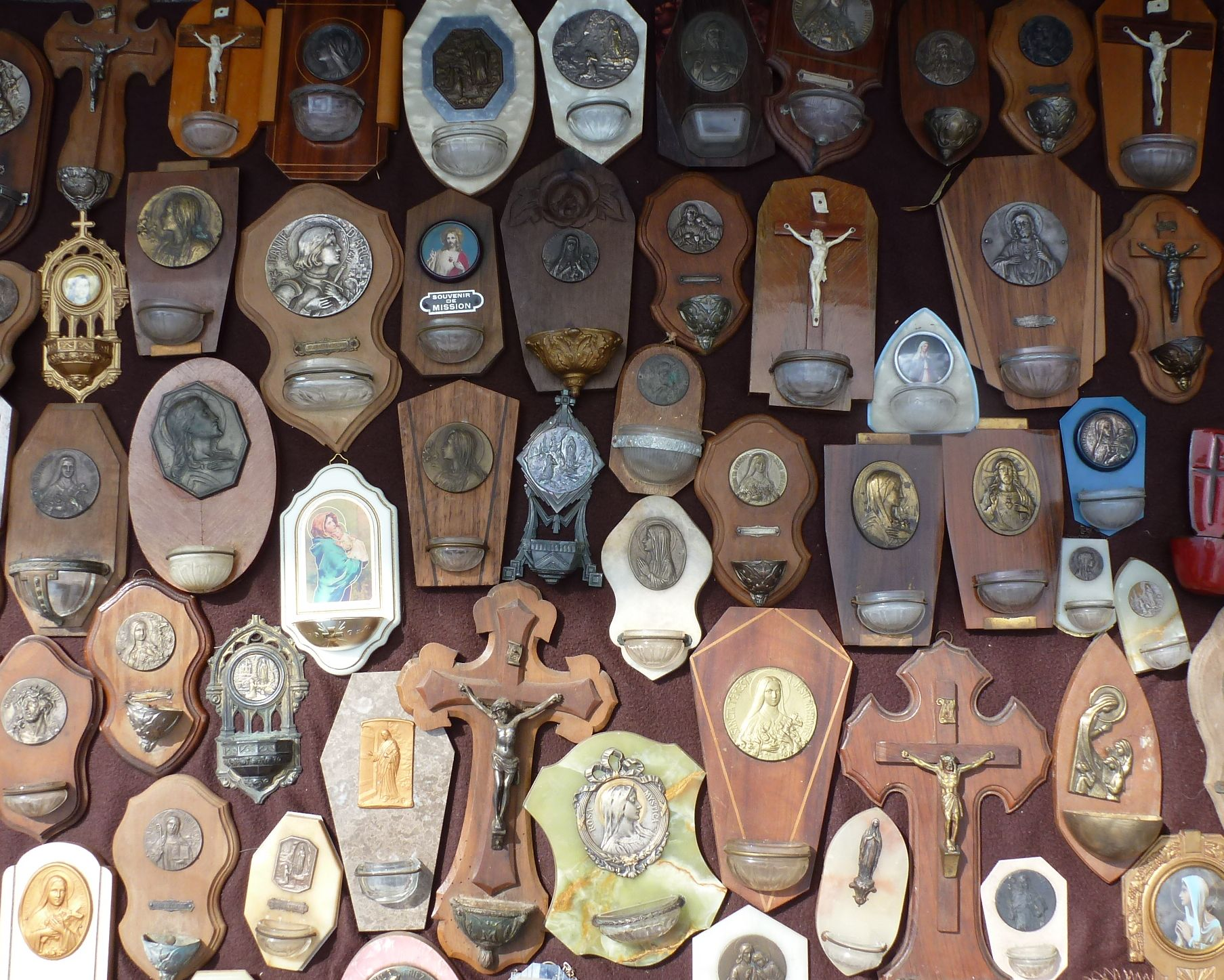 Weihwasserkessel (Marché au Puces, Dorlisheim/Alsace)